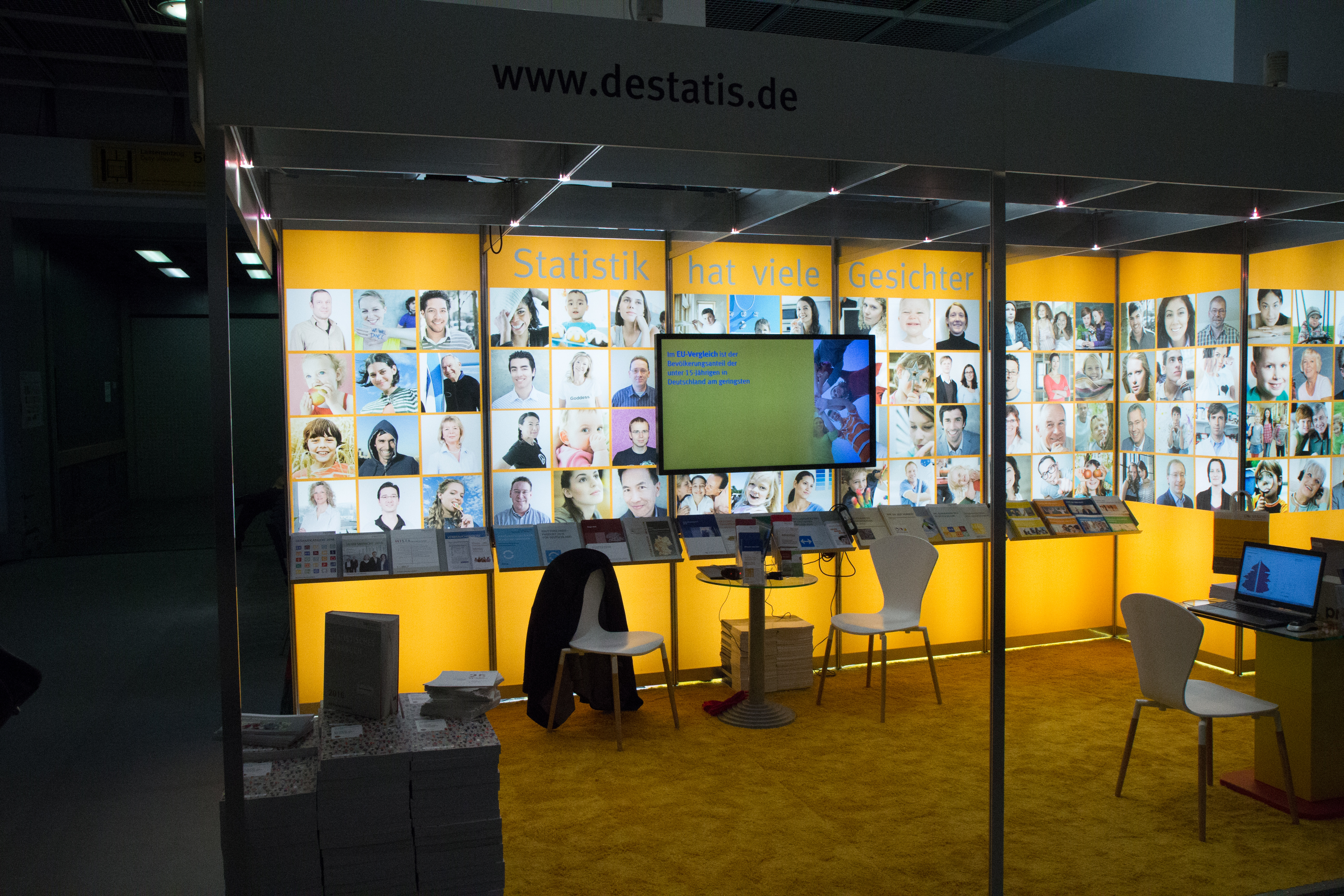 106. Deutscher Bibliothekartag in Frankfurt/Main